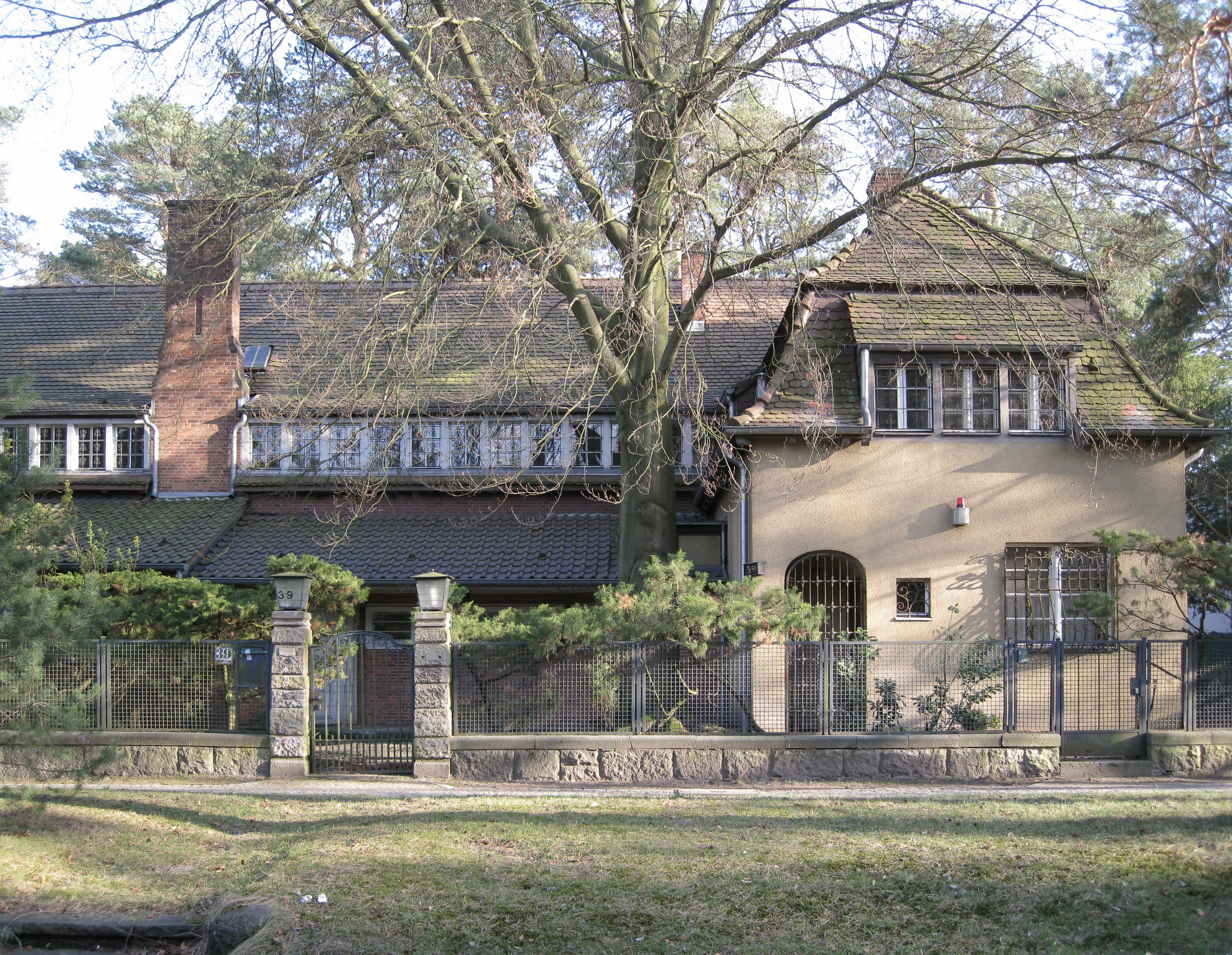 Wohnhaus